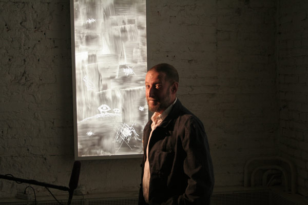 Художник Александр Бродский.